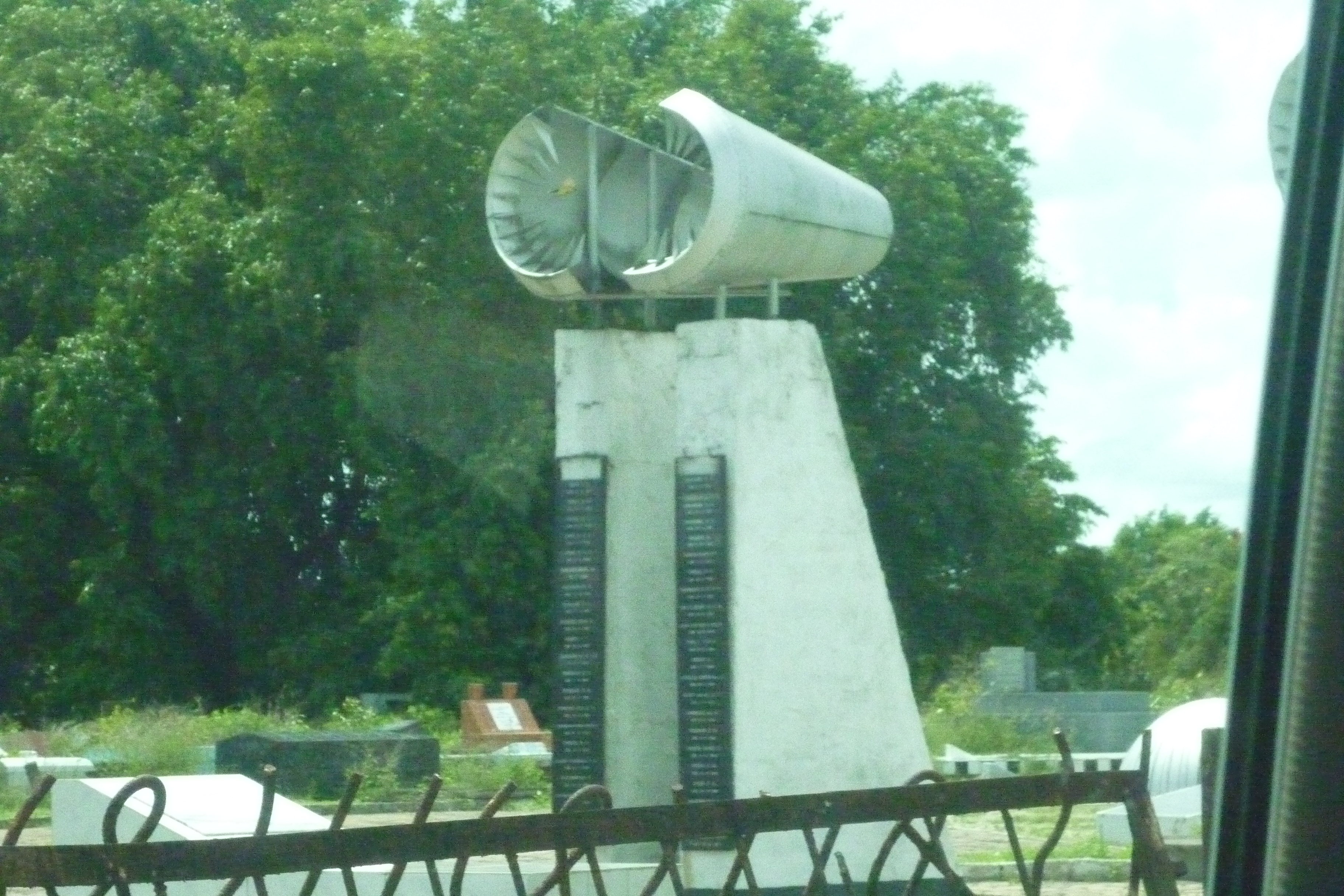 Monument SLM vliegtuigramp in Paramaribo